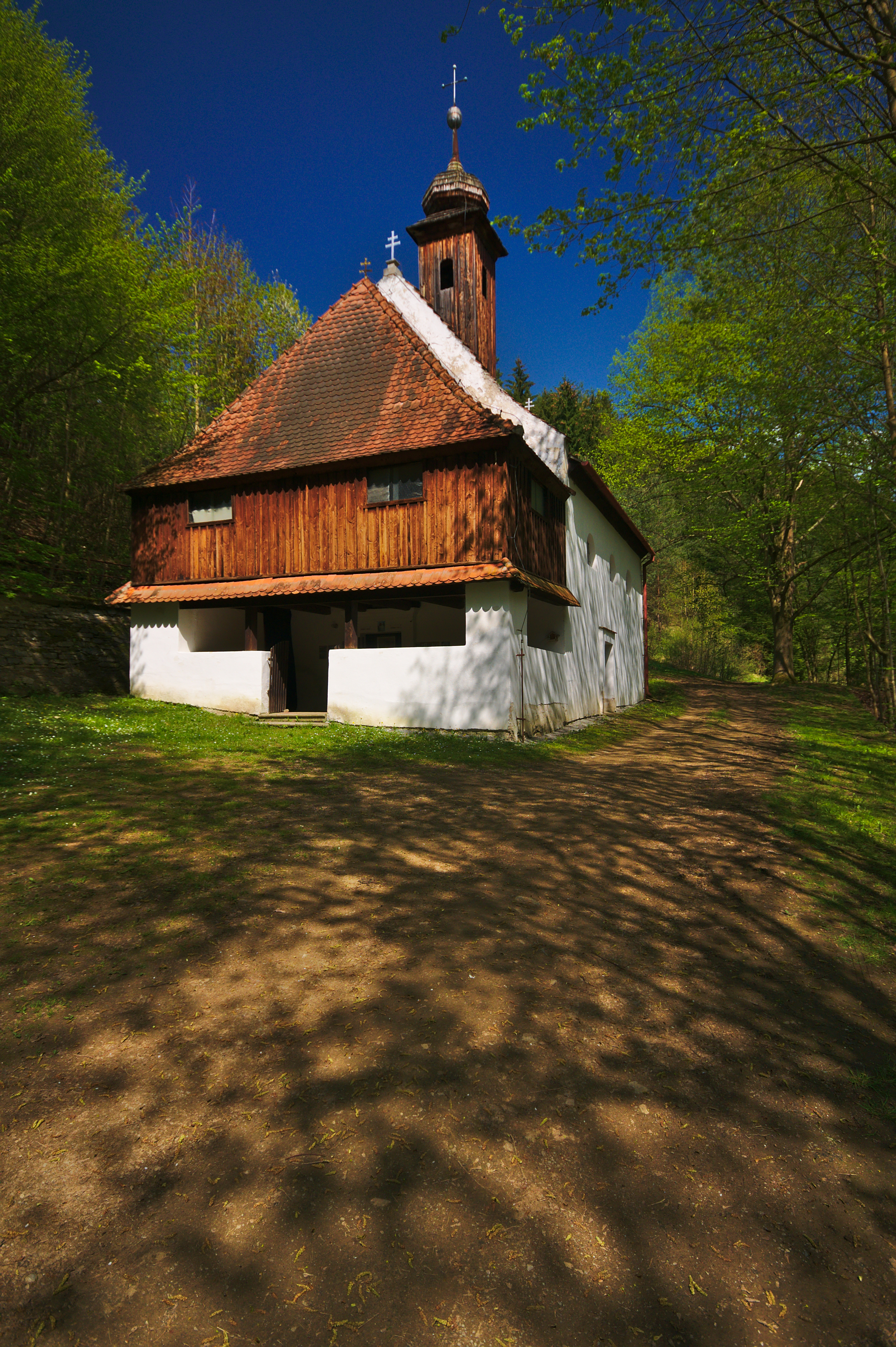 Kaple Nejsvětější Trojice, Švařec, Koroužné, okres Žďár nad Sázavou